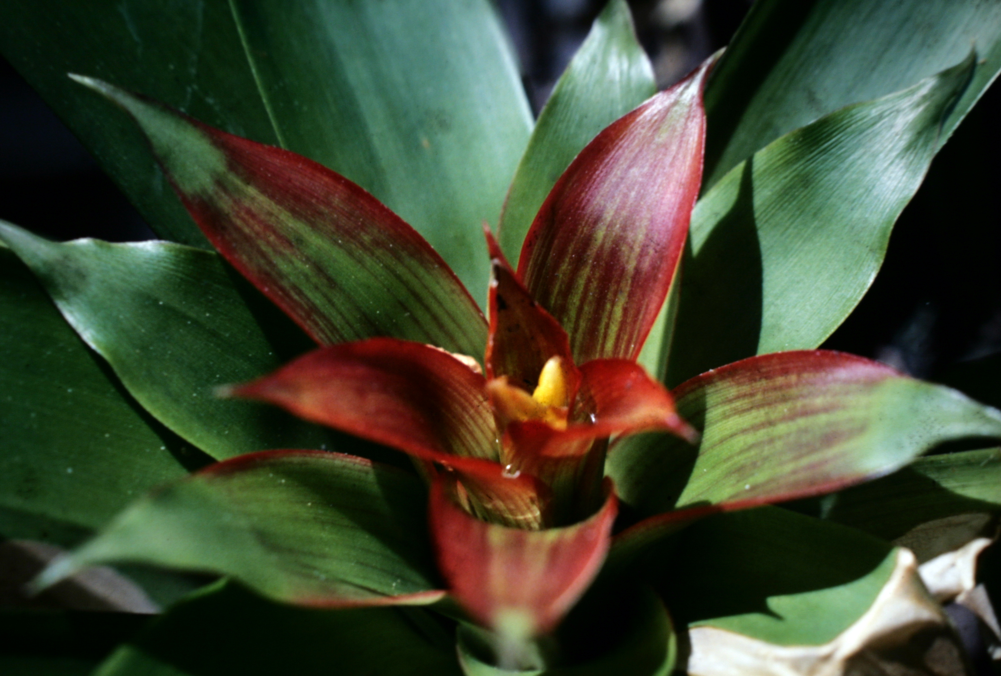 Guzmania lingulata , Suriname.